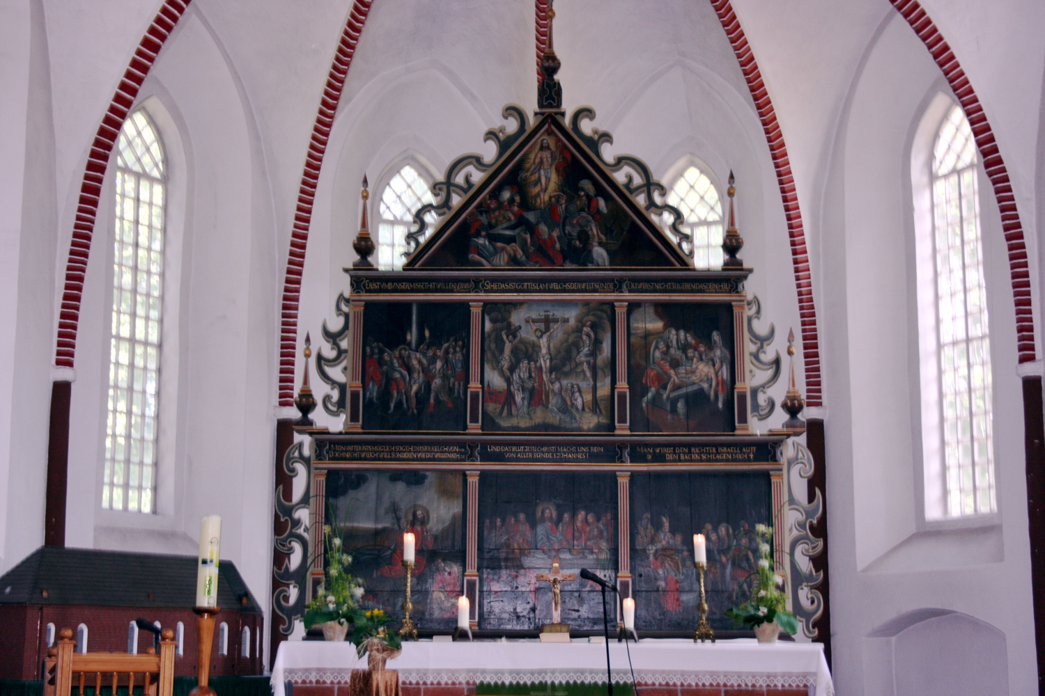 Kreisbahn Aurich Altar der Kirche Victorbur